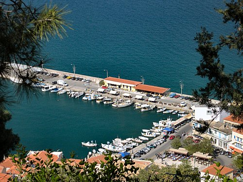 Το λιμάνι του Γυθείου (2005)